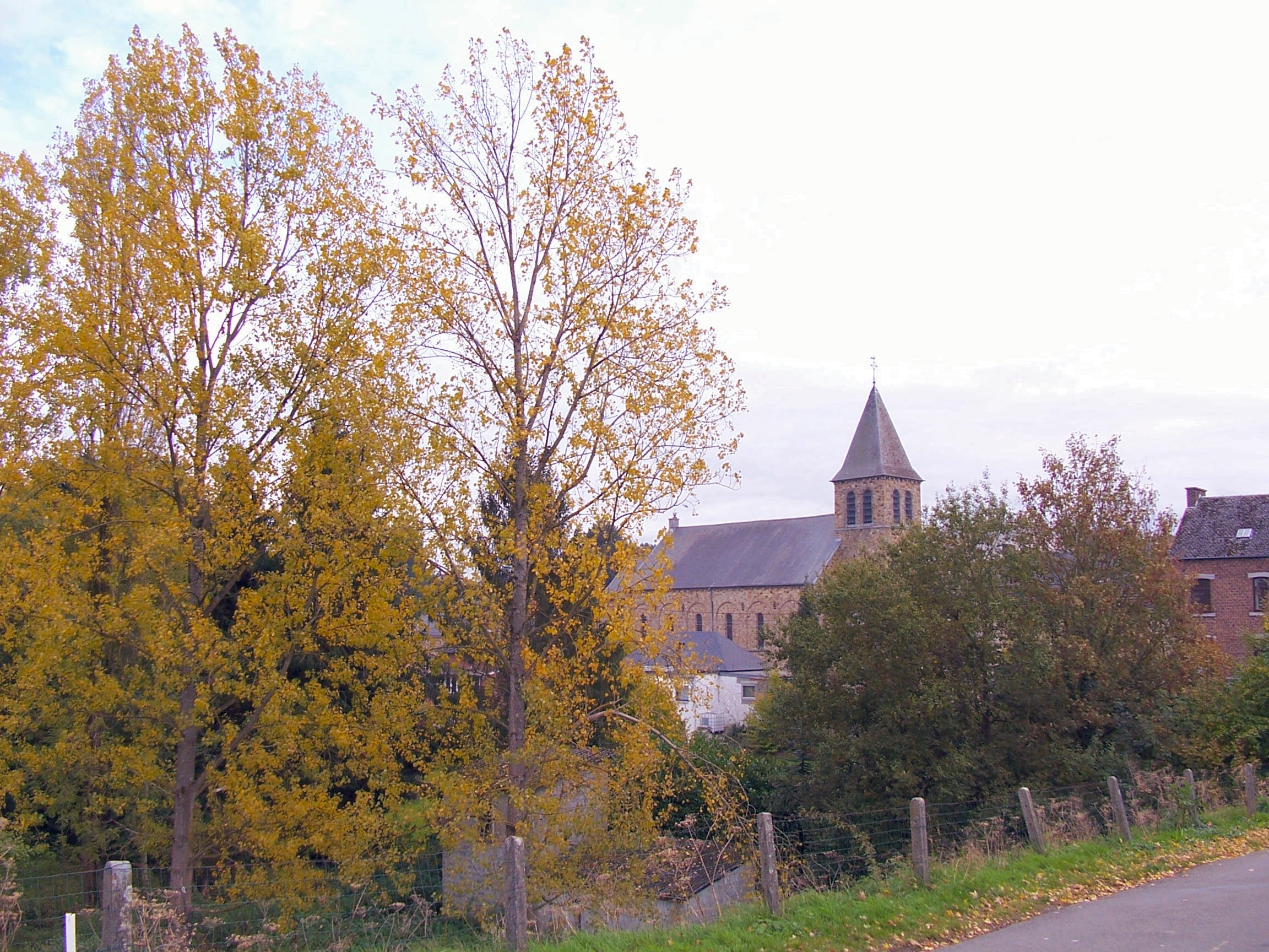 Een zicht op Sart-Bernard in de herfst.